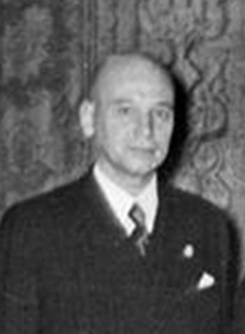 Otto Ulitz (1885–1972), deutscher Vertriebenenpolitiker aus Oberschlesien